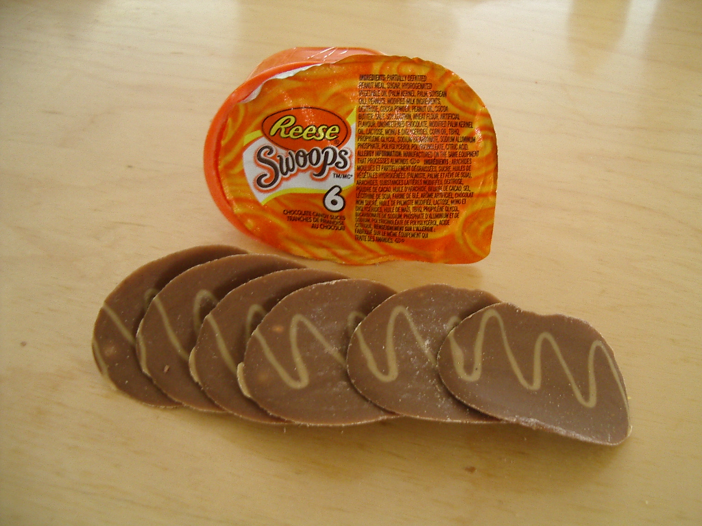 Reese Swoops